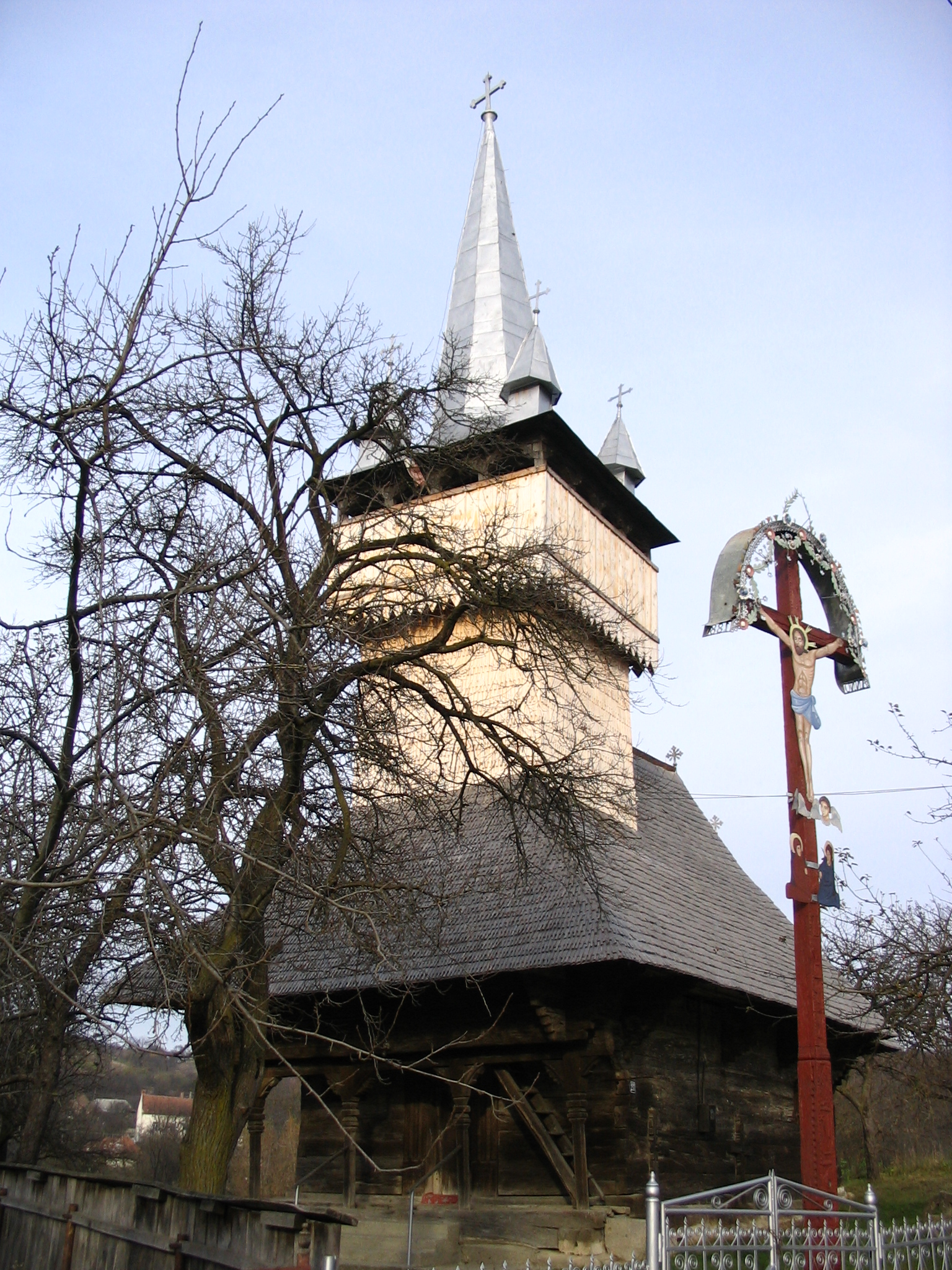 Biserica de lemn din Ulciug, judeţul Sălaj. Autor: Bogdan Ilieş Data: noiembrie 2005